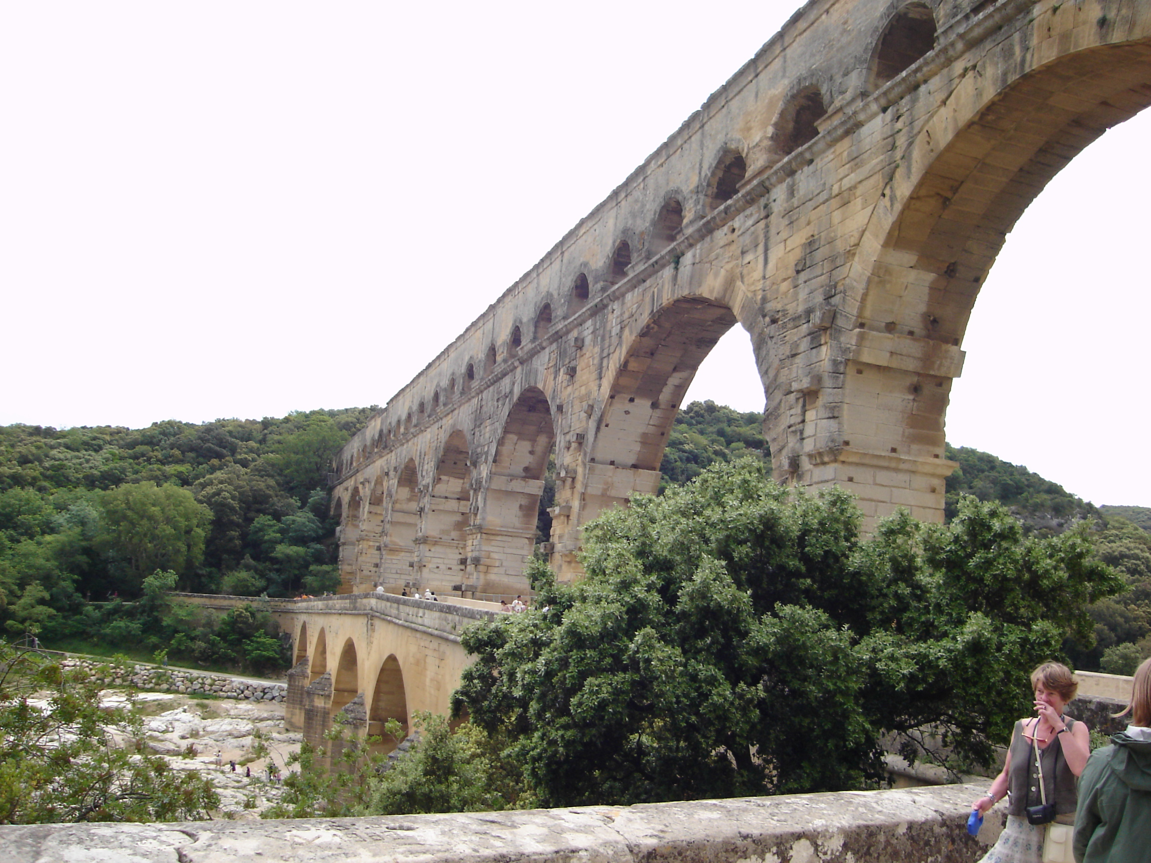 Old Roman aquduct Pont du Gard in France